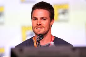 Stephen Amell (da série Arrow) irá se unir com Neville para enfrentae Stardust e King Barrett